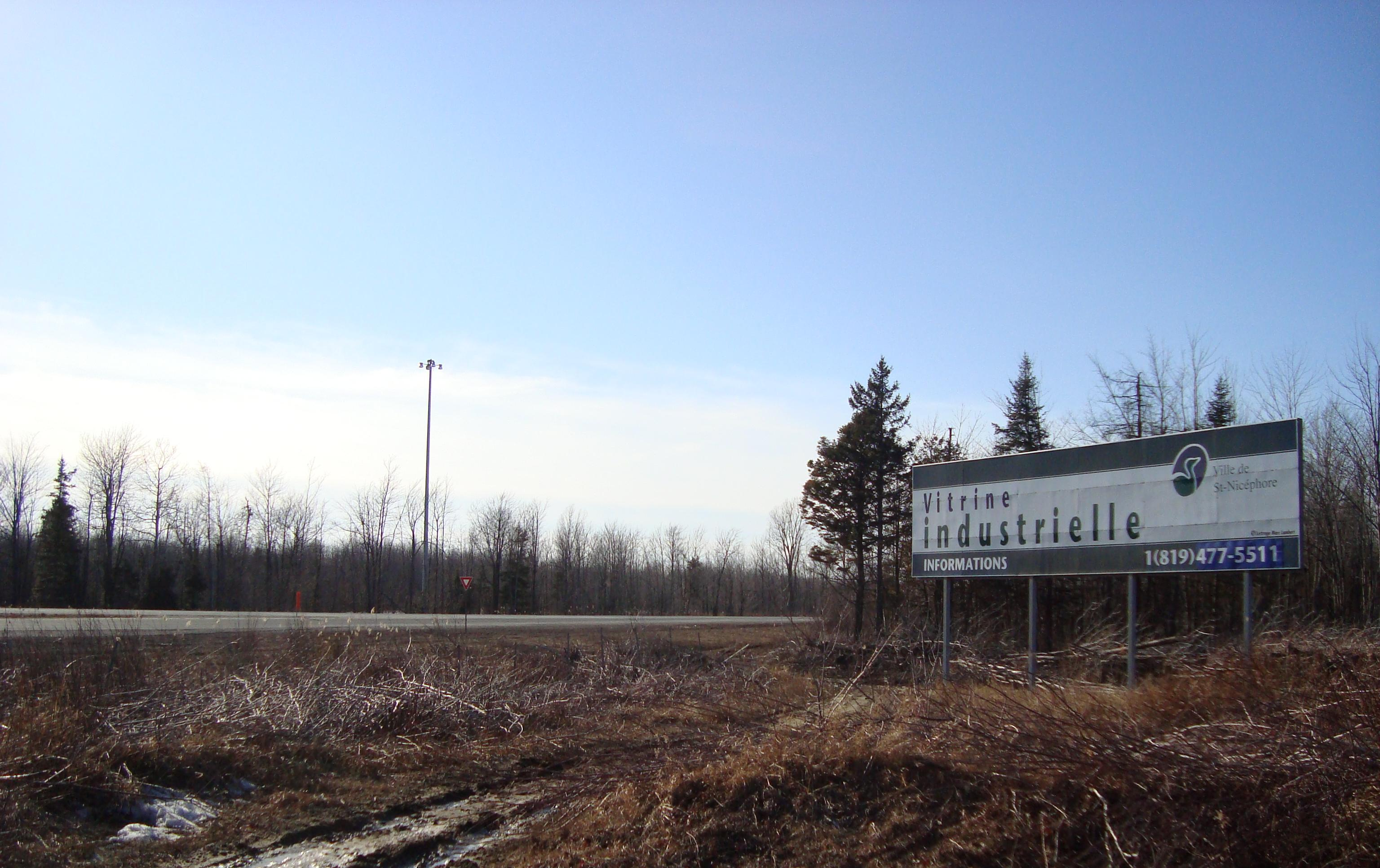 Panneau de la vitrine industrielle de Saint-Nicéphore sur le bord de l'autoroute 55 (Joseph Armand Bombardier)